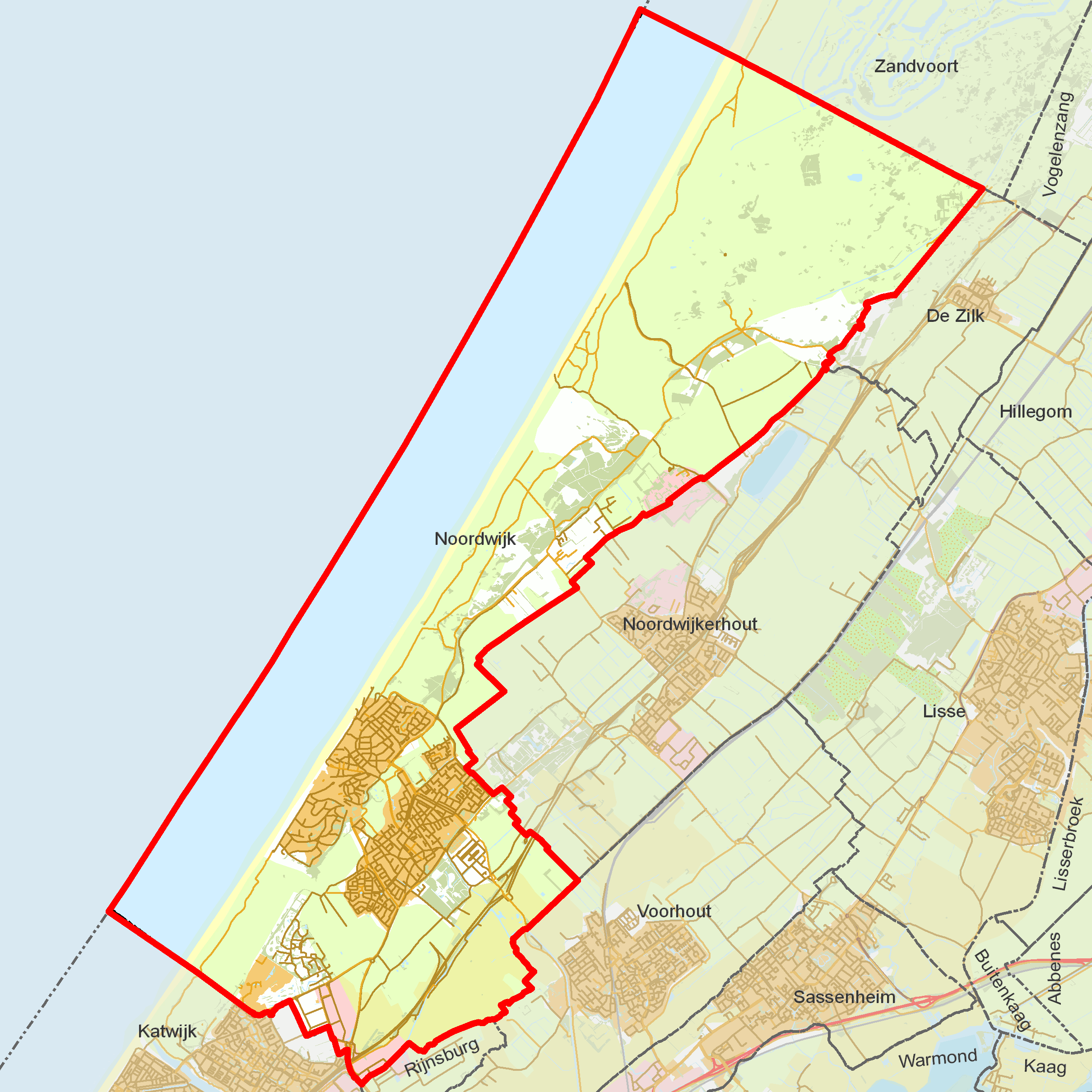 BAG woonplaatsen - Gemeente Noordwijk.png